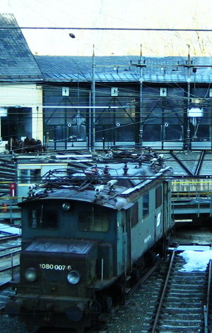 Baureihe 1080 in Selzthal, auf der Drehscheibe.